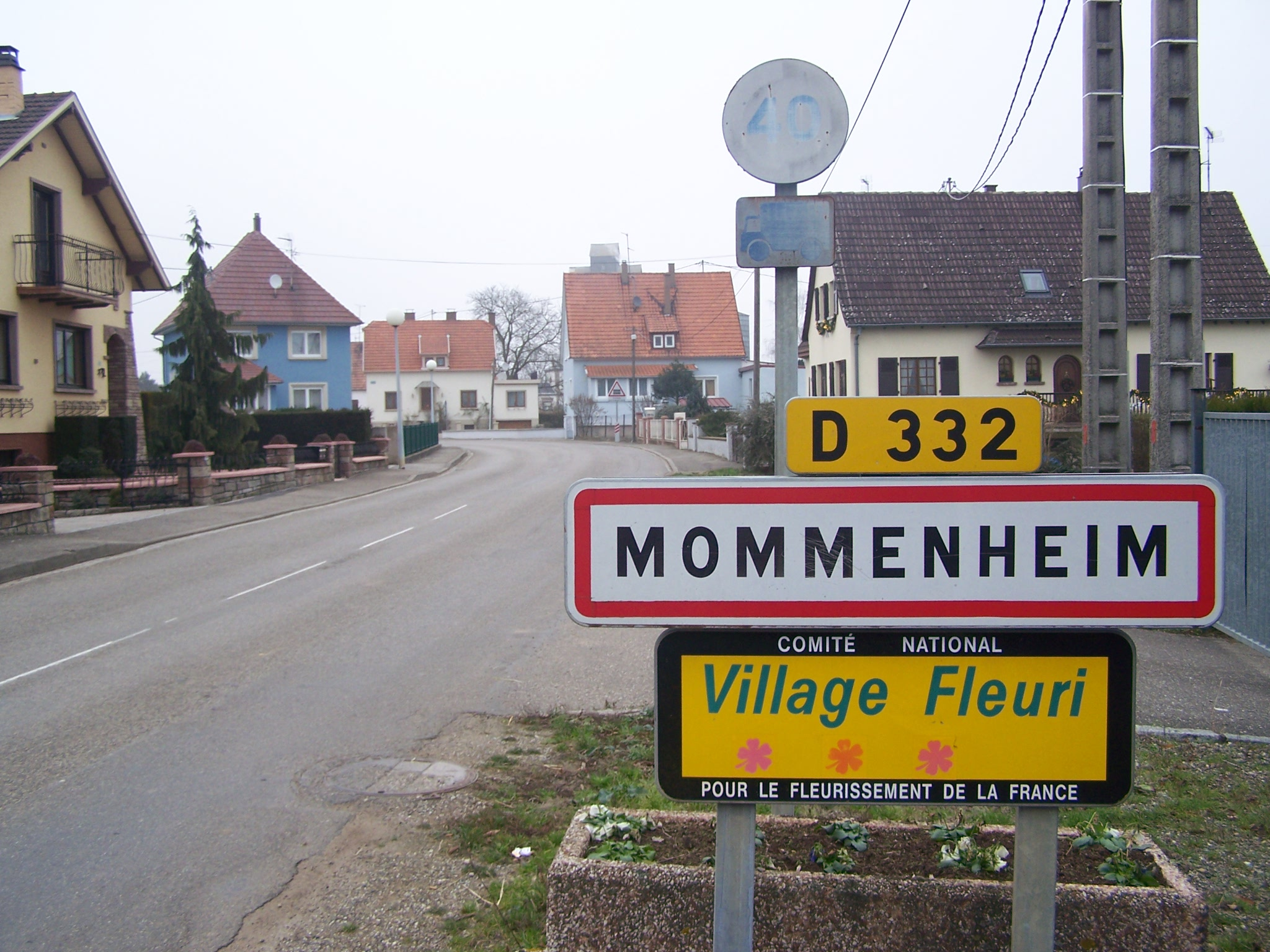 Panneau marquant l'entrée à Mommenheim, le 28/12/06. Photo personnelle.